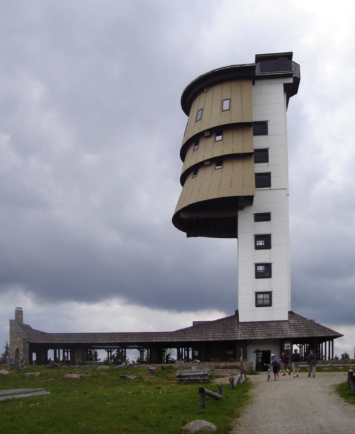 Rozhledna na Poledníku (Šumava, ČR).